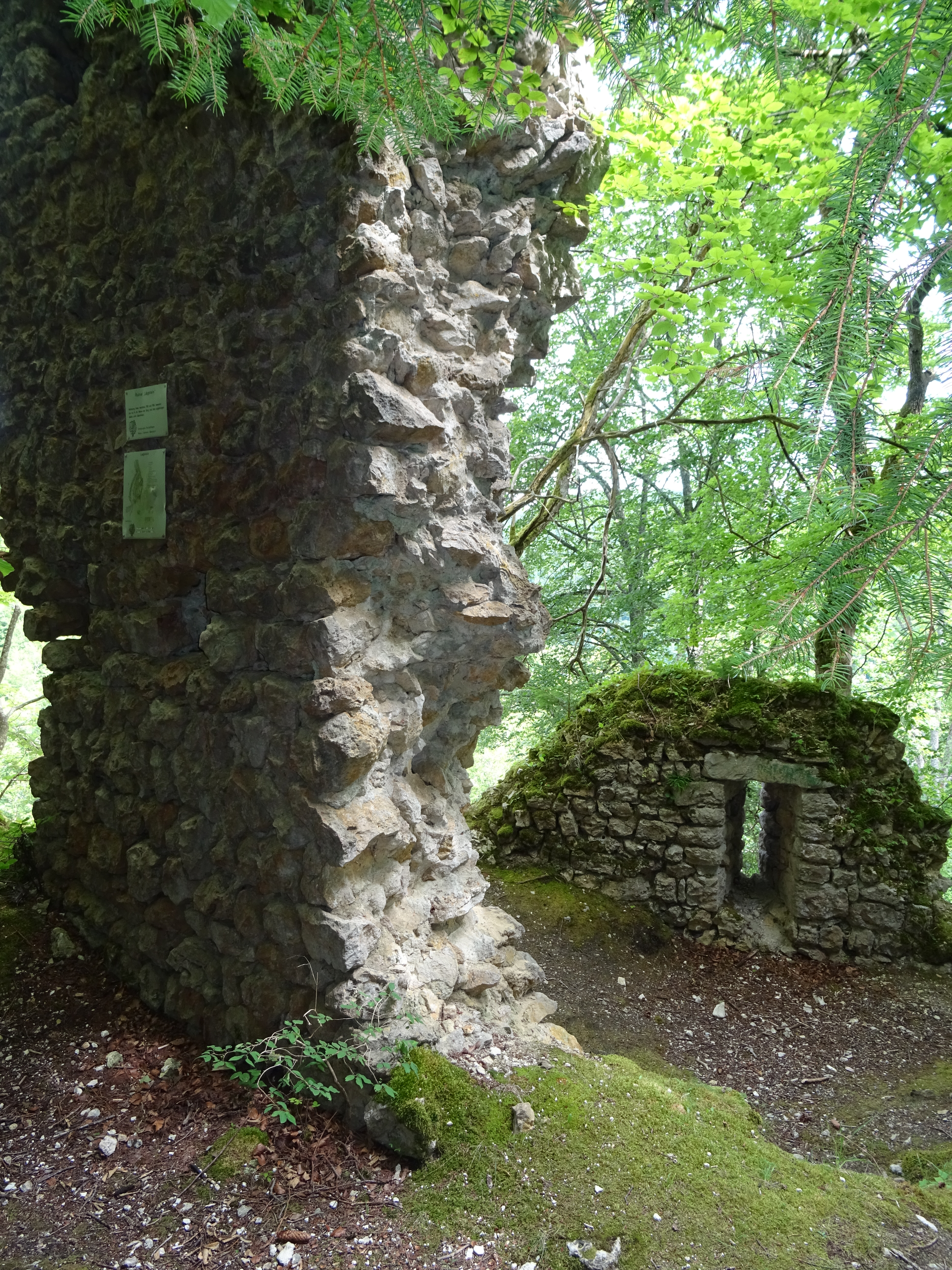 Ruine Leckstein, aufgenommen am 16.07.2017